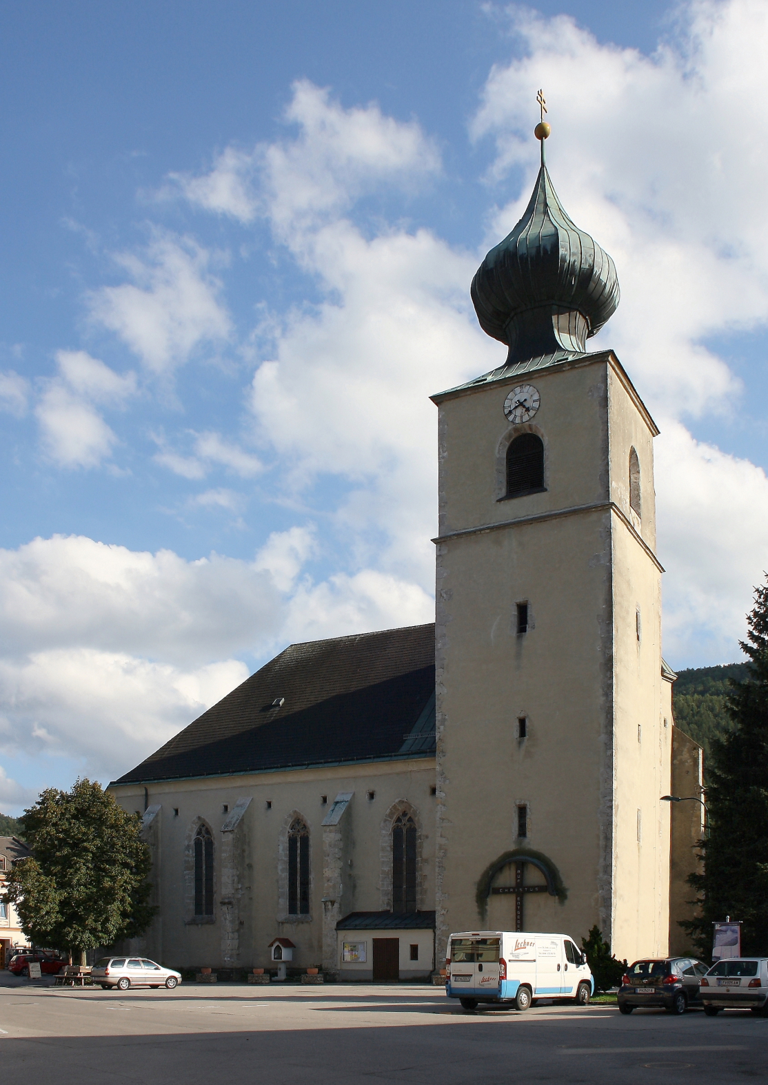 Die Pfarrkirche der niederöstereichischen Gemeinde St. Veit an der Gölsen